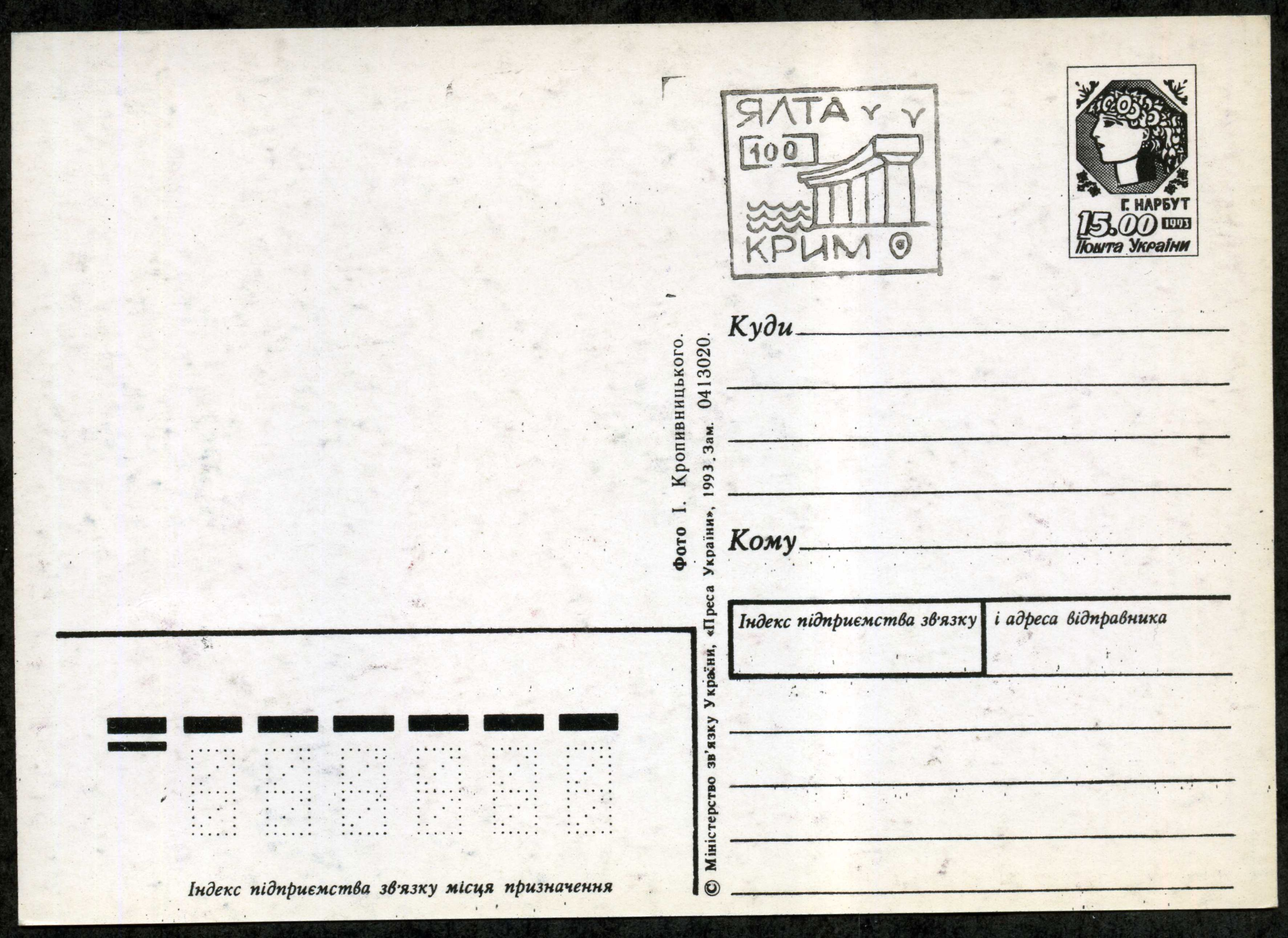 Конверт Украины